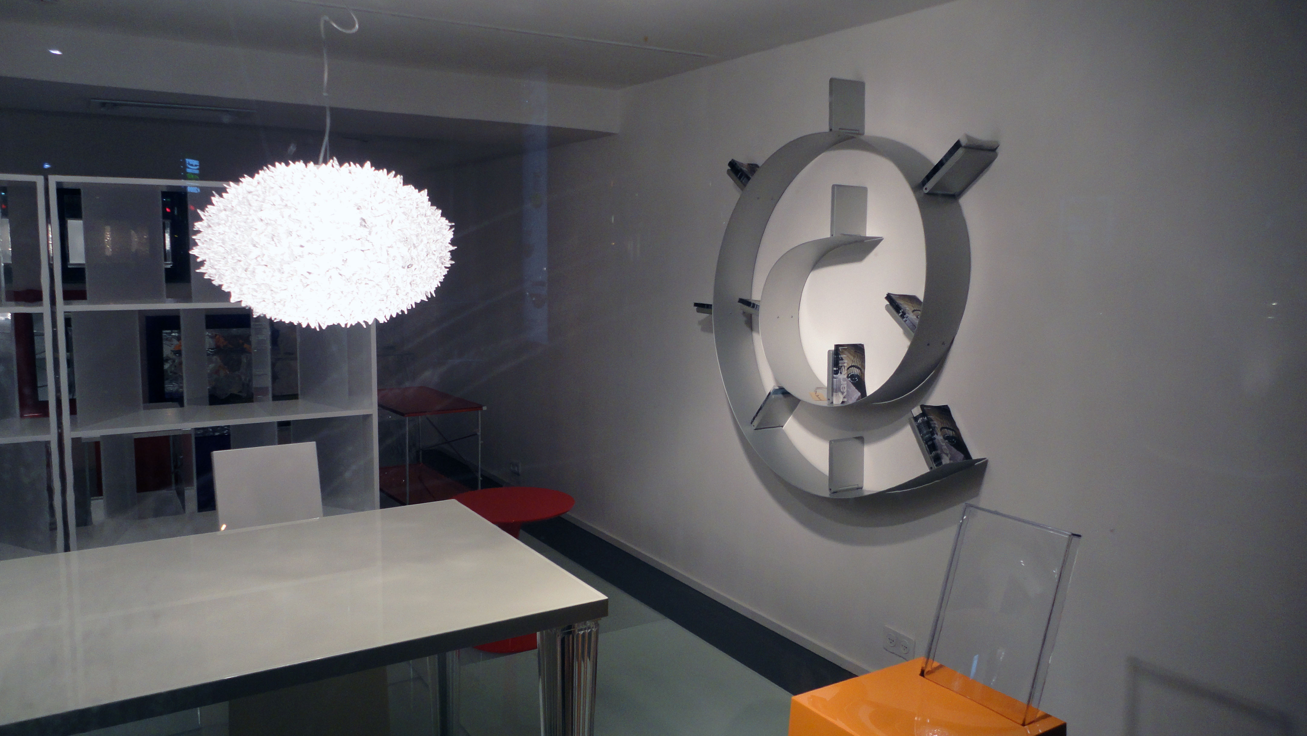 Design